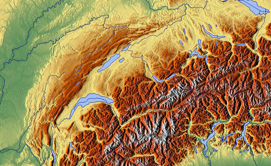 Reliefkarte des Schweiz-Französischen-Juras